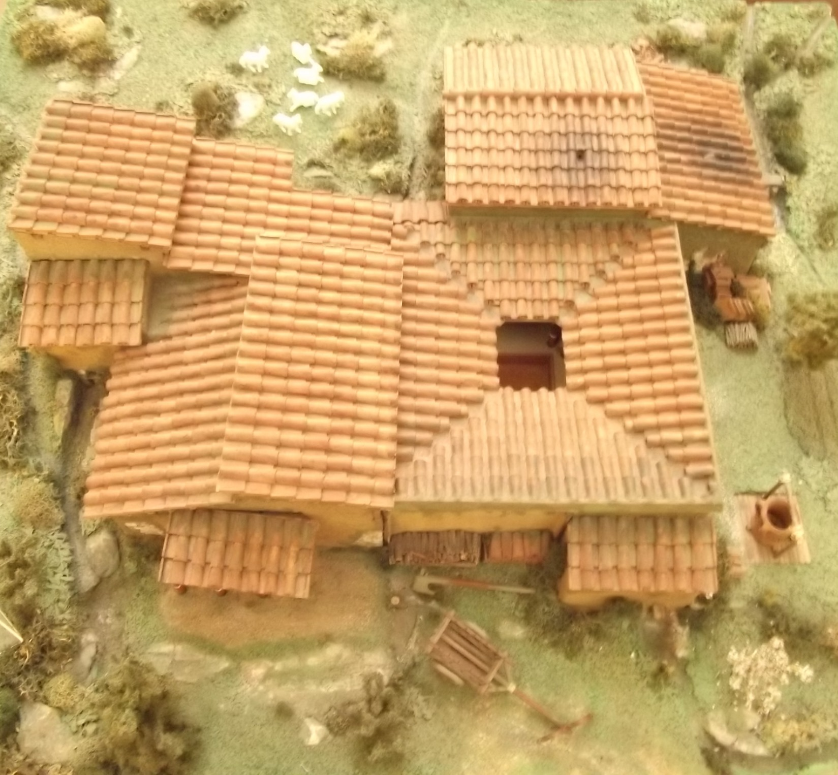 Diorama einer antiken Villa im Archäologischen Museum von Grosseto